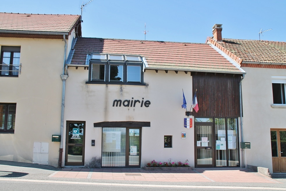 Mairie de Villosanges (63).